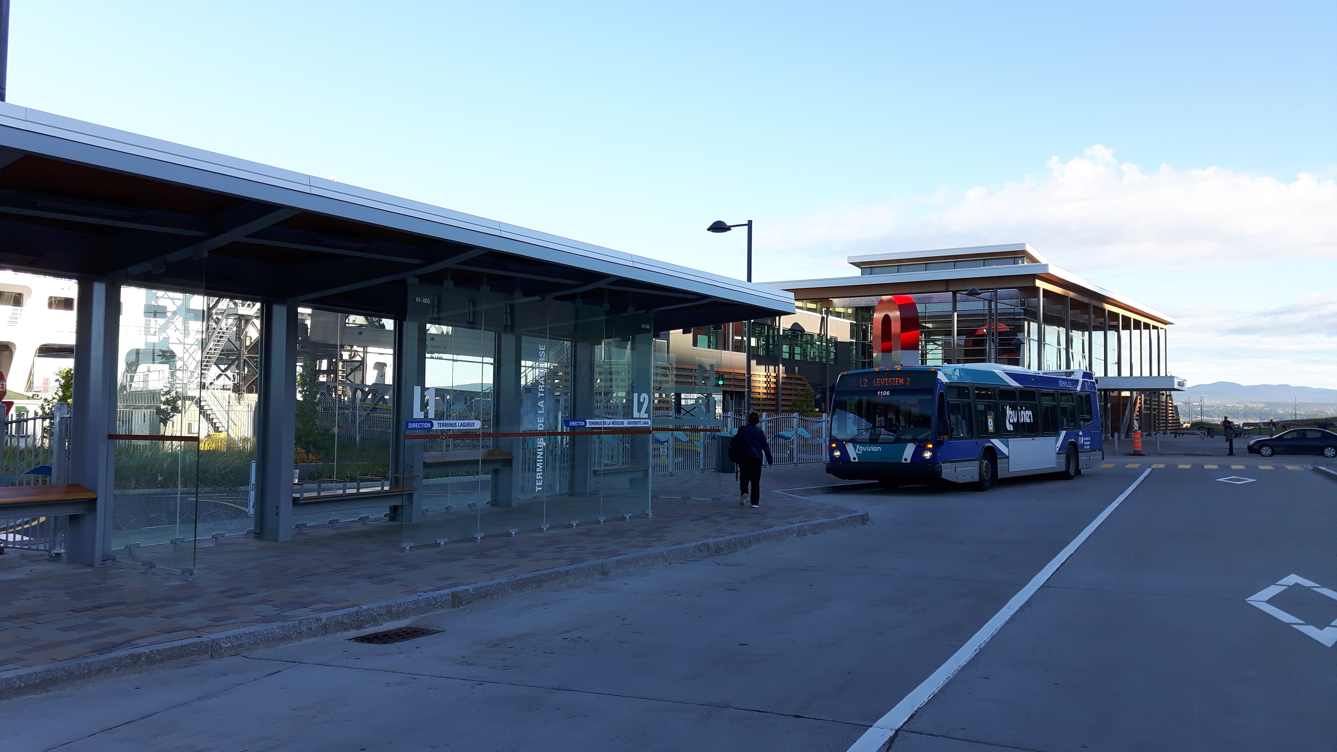 Un autobus Nova Bus LFS 2011 de la Société de transport de Lévis en attente à son terminus de la gare fluviale de Lévis.